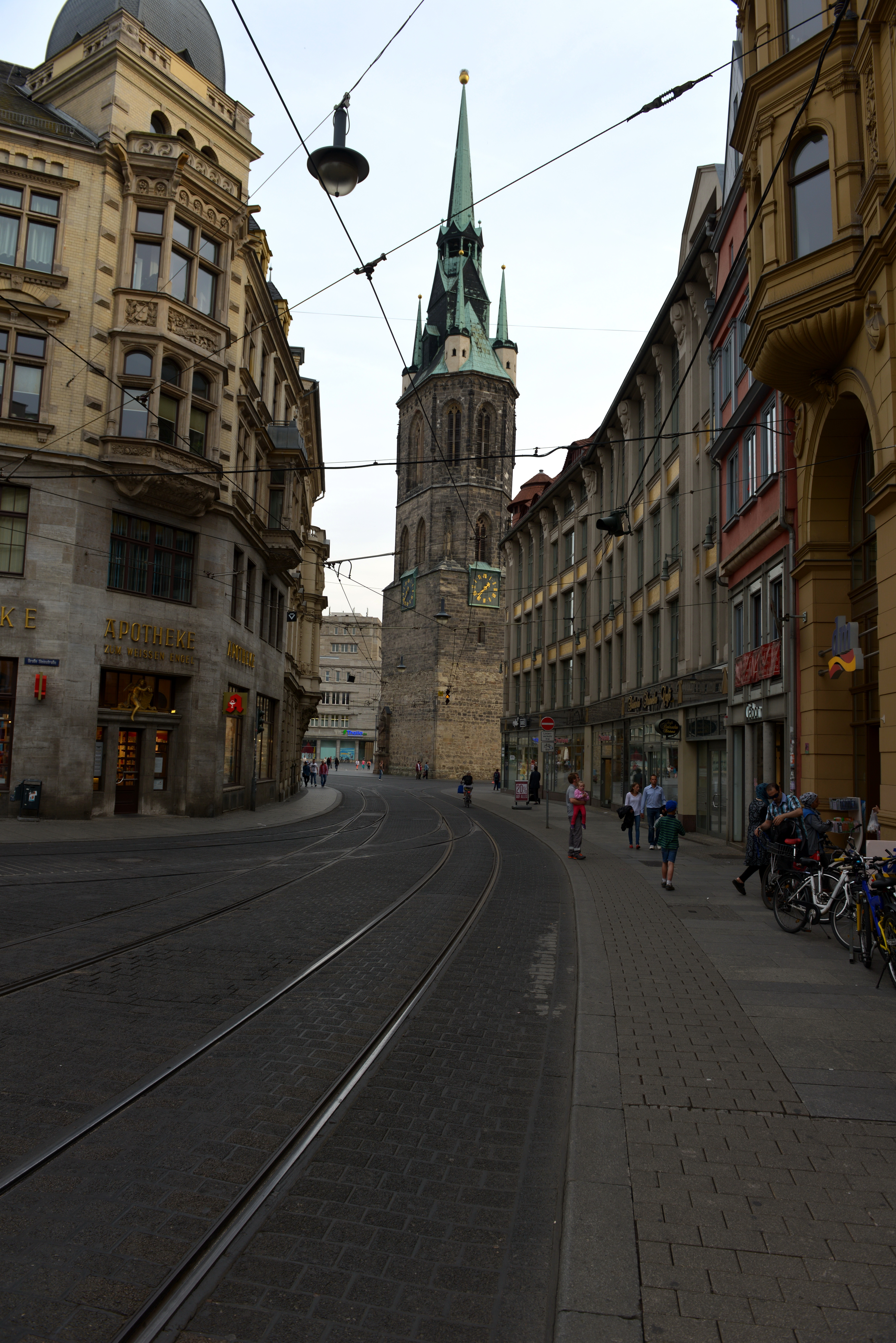 Halle/Saale The making of this document was supported by the Community-Budget of Wikimedia Germany.